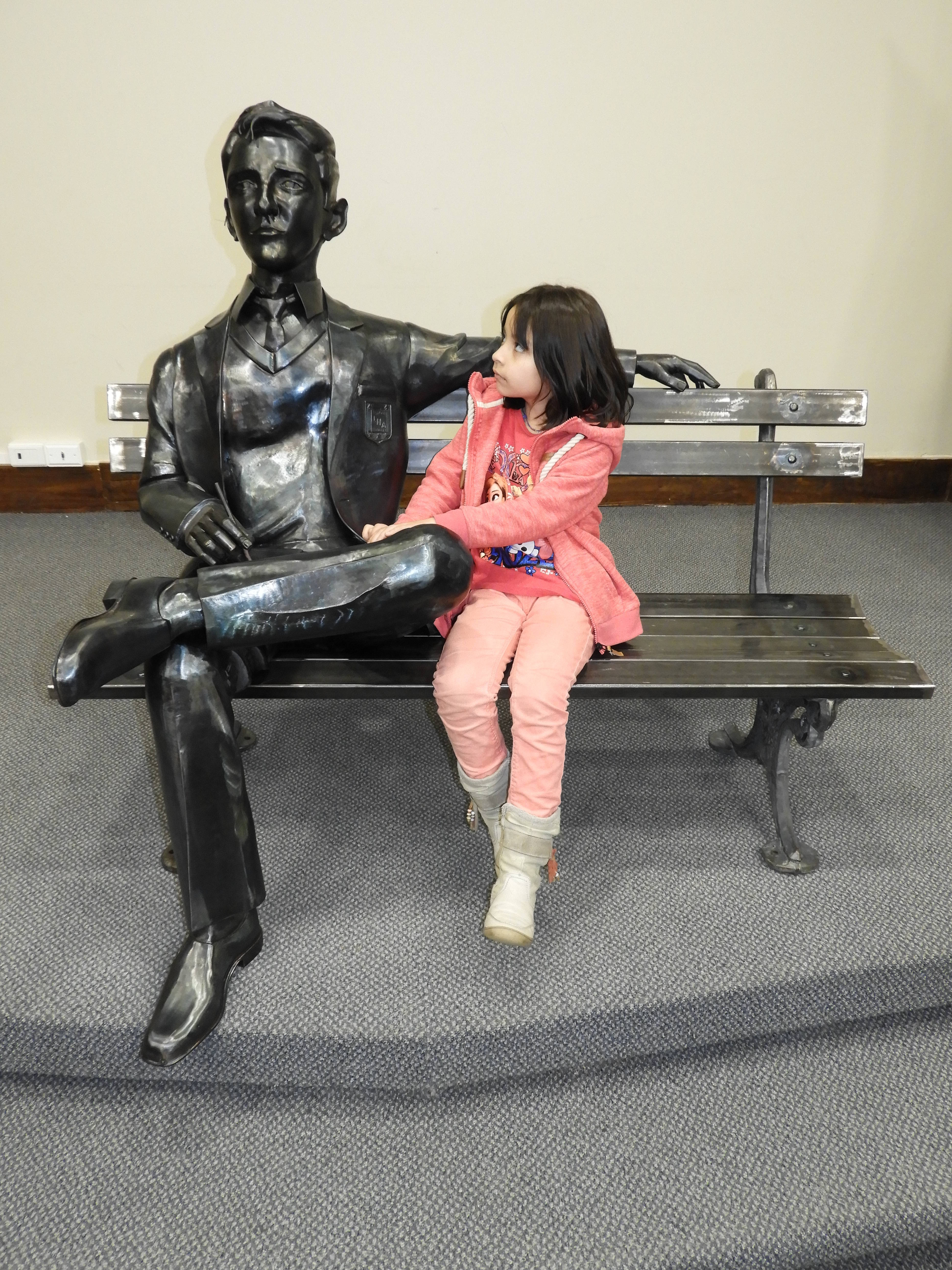 Escultura de Bolaño retratándolo cuando, en 1968, era un joven estudiante de tercero de Humanidades del Liceo de Hombres de Los Angeles. La obra es del angelino Juan Carlos Rivas.